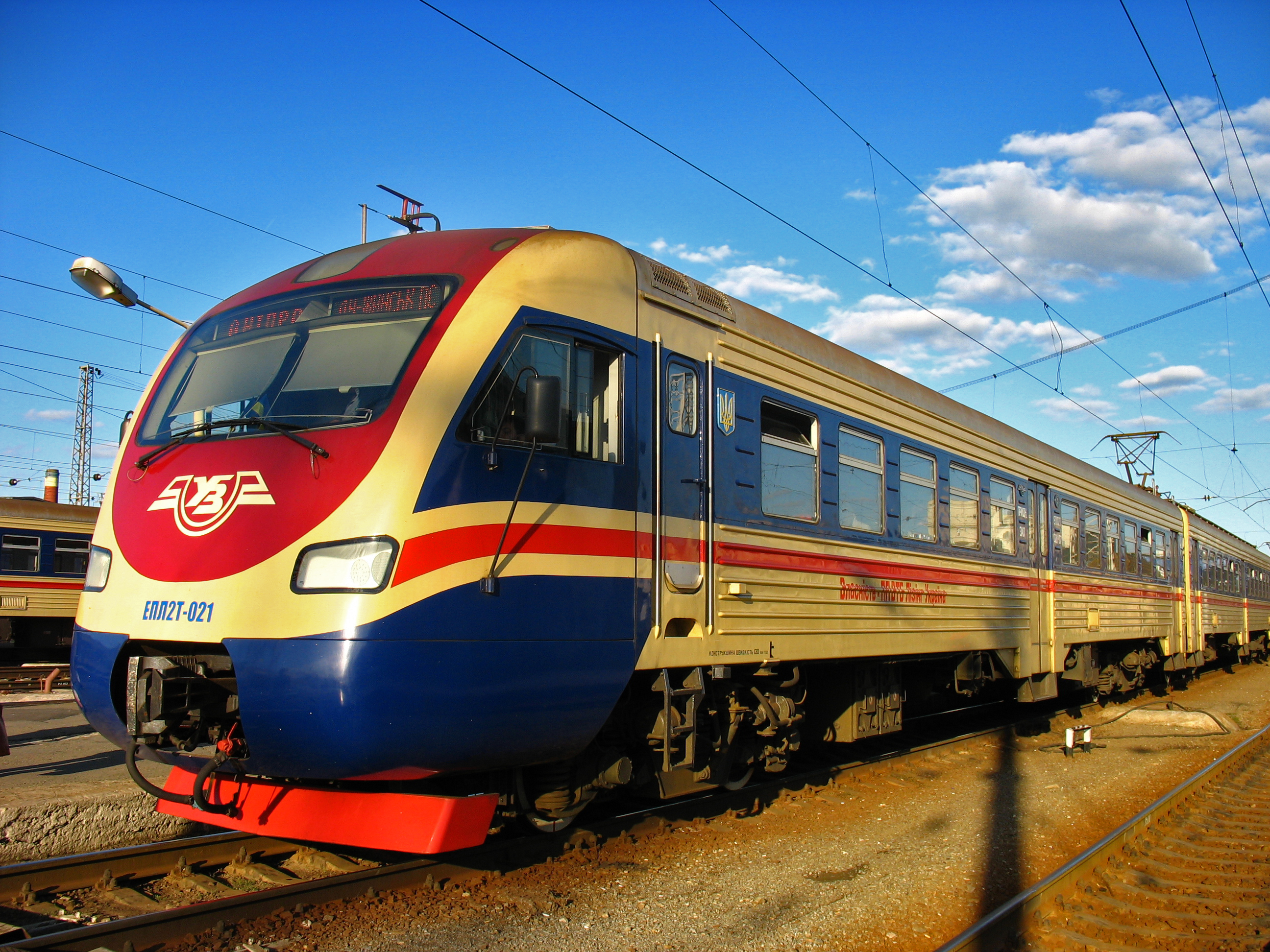 Фотография сделана на ст. Днепропетровск-Главный в октября 2007-го года. Электропоезд ЭПЛ2Т-021 построен на Луганском тепловозостроительном заводе в 8-ми вагонной составности, в 2007-м году. С завода поступил в депо Днепропетровск Приднепровской ж.д.